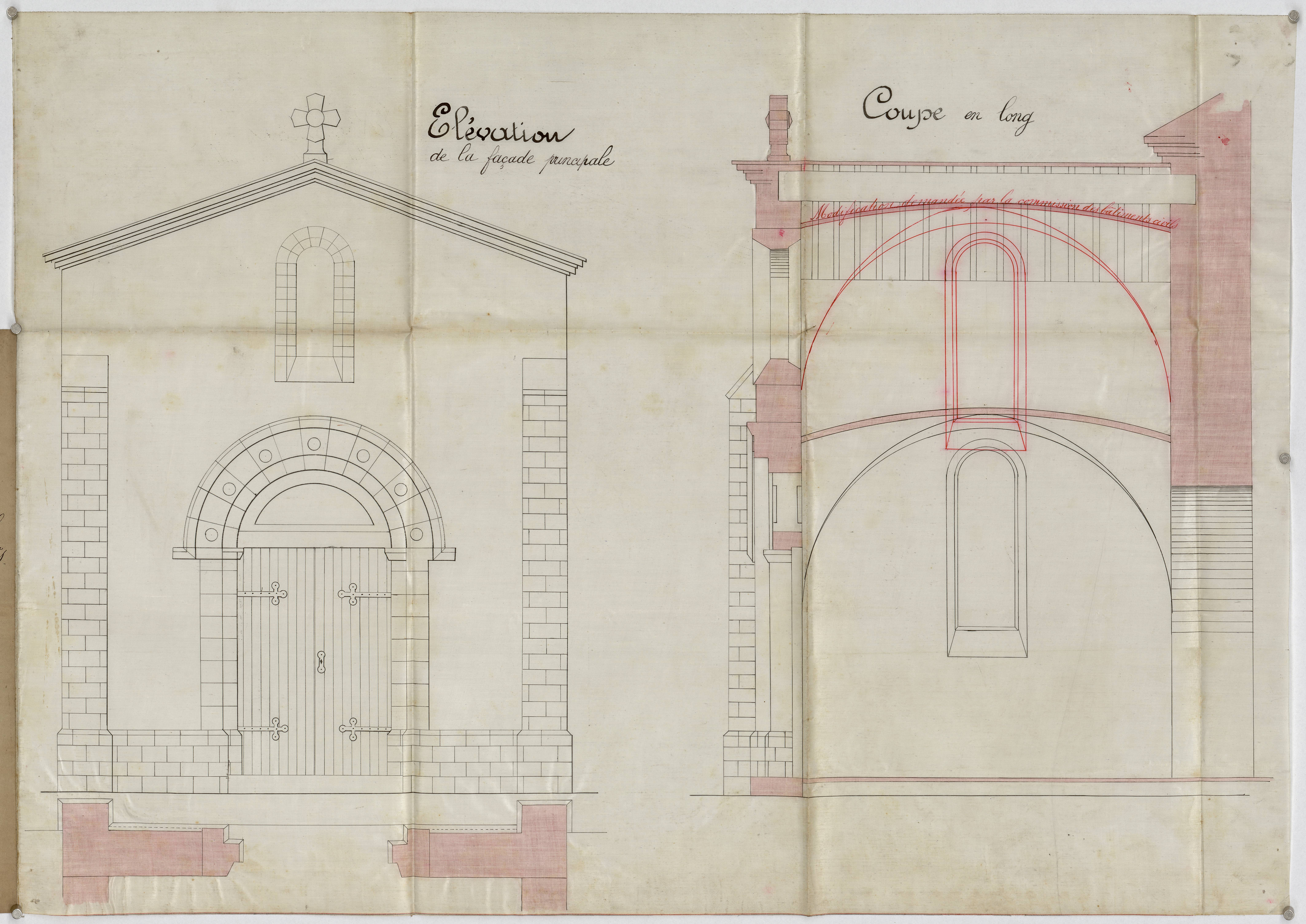 Agonès. - Plan, élévation et coupe d'une église